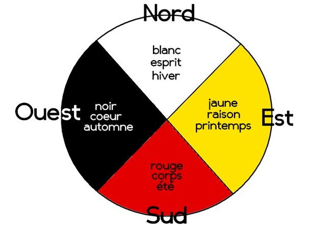 Cercle de vie